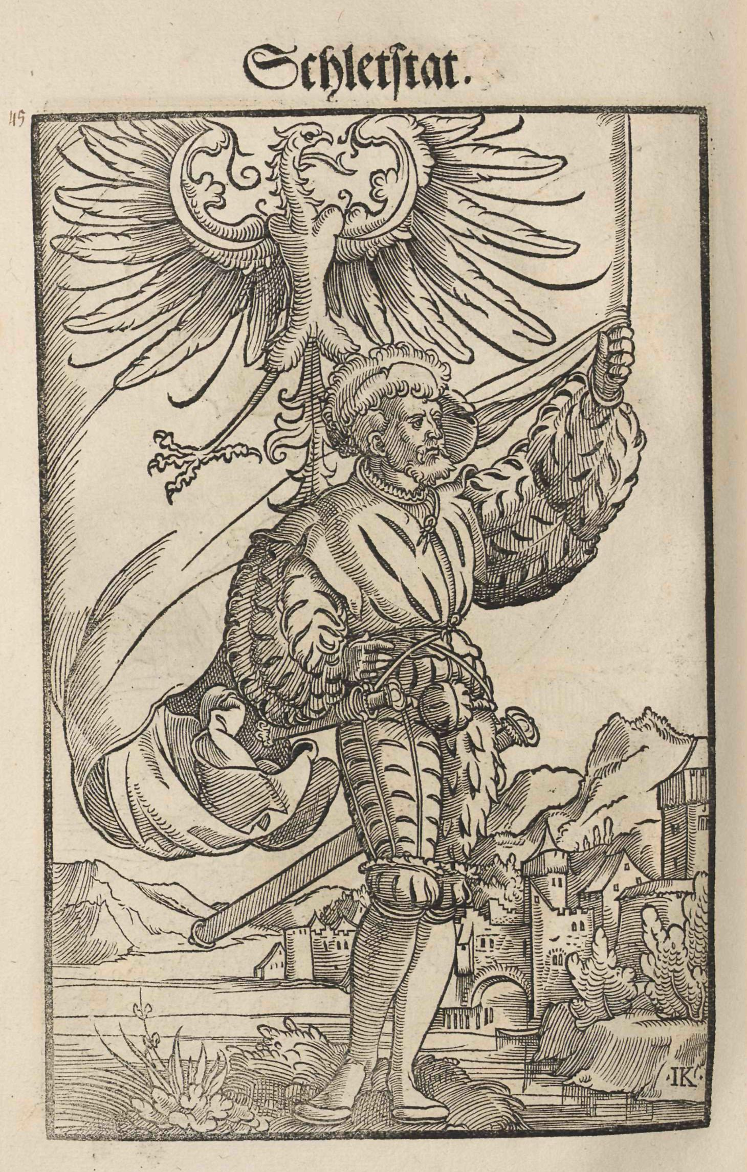 Jacob Koebel (Vorrede): Wapen. Des Heyligen Römischen Reichs Teutscher nation. Gedruckt bei Cyriacus Jacob (evtl. auch Herausgeber/Autor), Frankfurt am Main 1545, Holzschnitte von Jacob Kallenberg. Zu Angaben zur Tingierung (Farbgebung) der Wappen siehe das Register ab Bild Nr. 165. Schletstat (Schlettstadt, Sélestat)